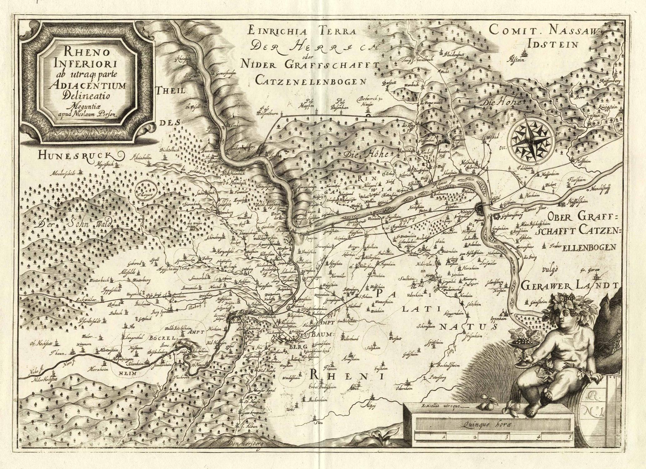 Rheno Inferiori ab utraqe parte Adiacentium Delineatio: Eine Karte (Kupferstich) aus dem Atlas Novae Archiepiscopatus Moguntini Tabulae von dem Mainzer Kartographen Nikolaus Person aus dem Jahre 1694. Das Blatt ist annähernd nach Norden ausgerichtet und zeigt hauptsächlich die nordwestliche Pfalz. Ungefähr in der Mitte ist Kreuznach (Creutznach) zu finden, links im Westen Hunsrück (Hunesruck) mit Soonwald (Sohn Wald).